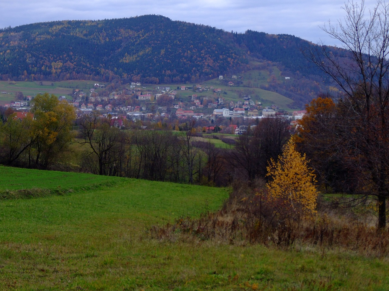 Tymbark i wznoszący się ponad nim Zęzów